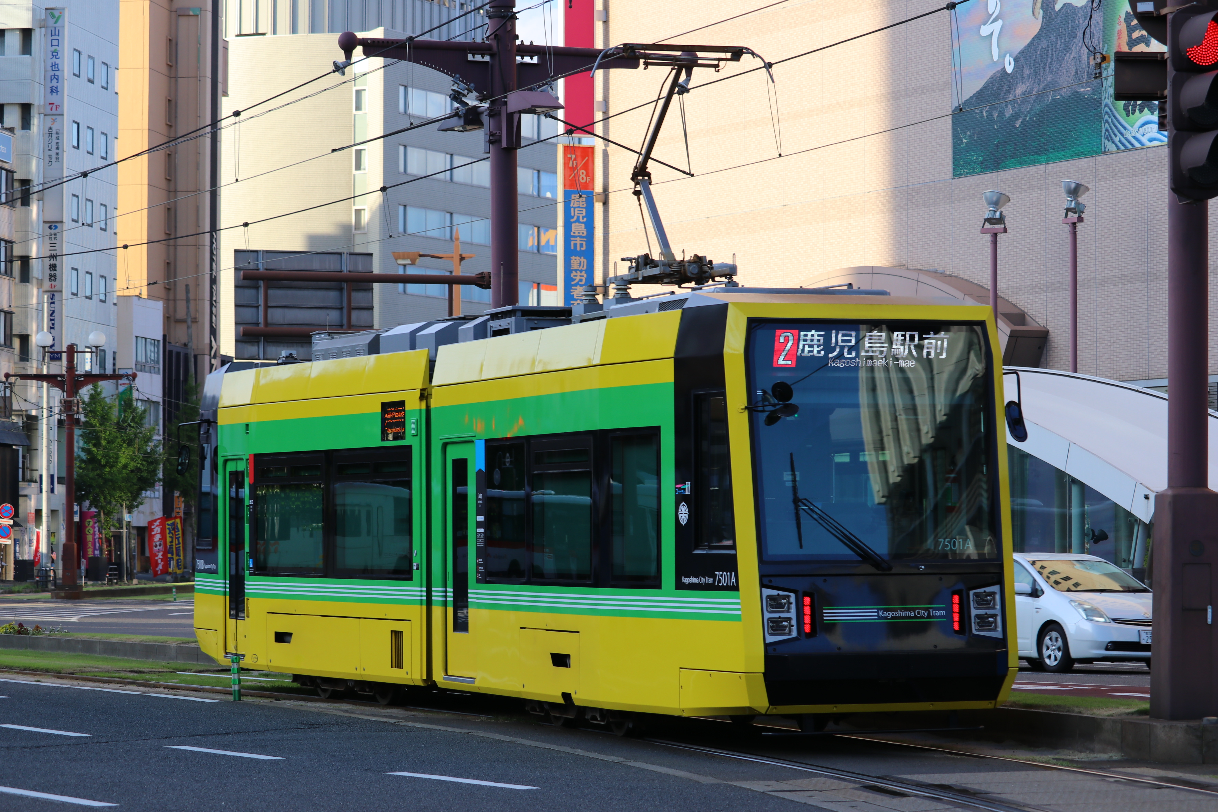 鹿児島市交通局7500系 鹿児島中央駅にて